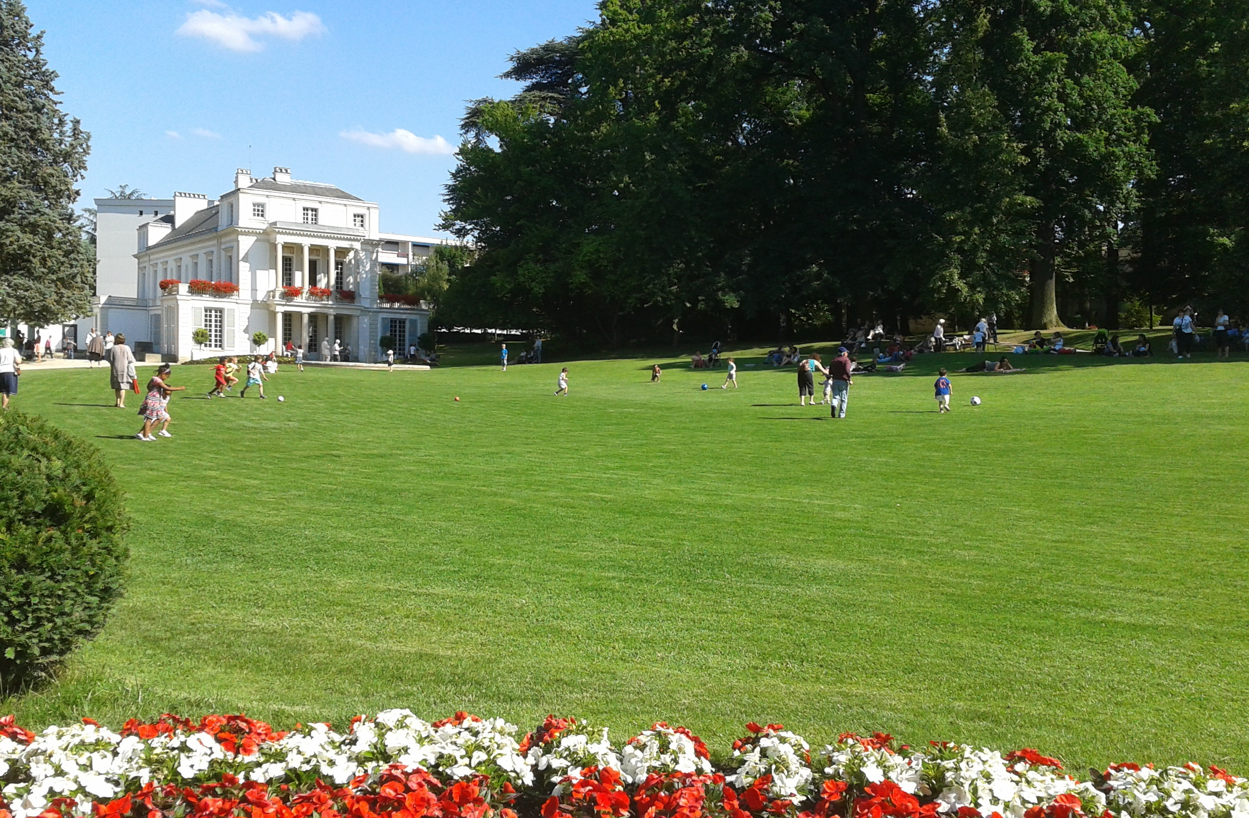 Propriété Caillebotte, le parc et le casin .